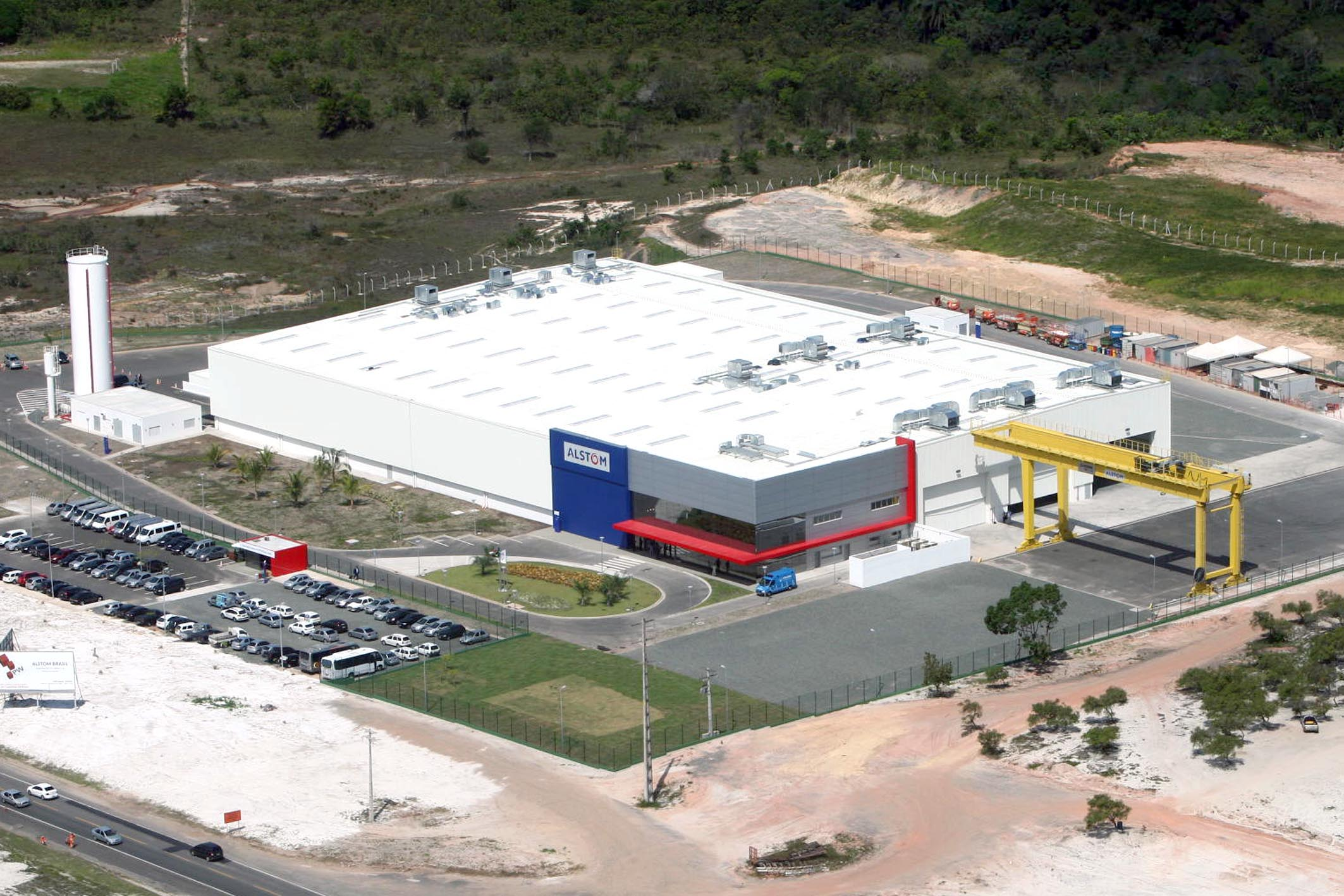 Governador Jaques Wagner participa da inauguração da Fábrica da Alstom Brasil em Camaçari. Foto: Manu Dias/SECOM